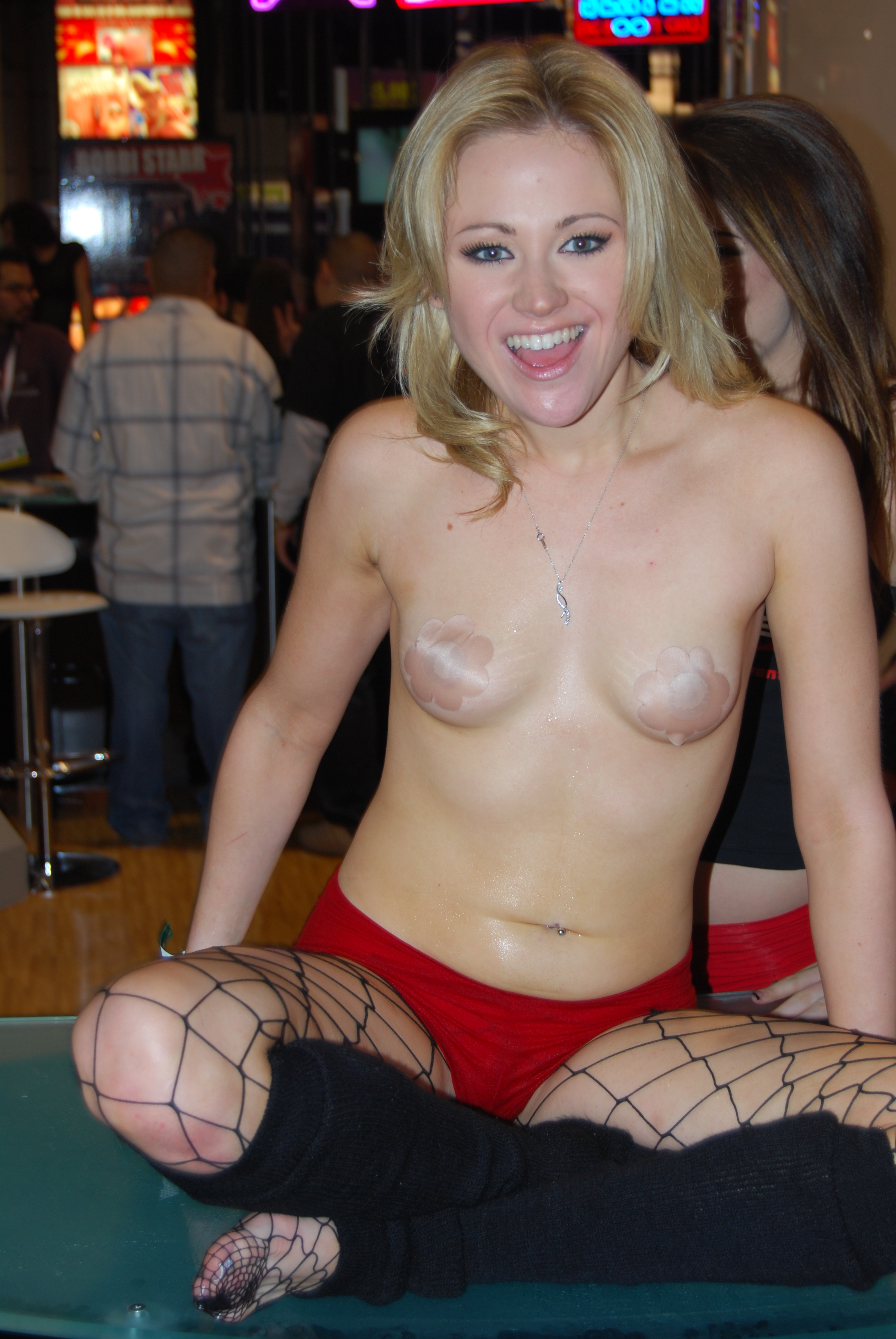 AEE2008_Nikon_Day2 355